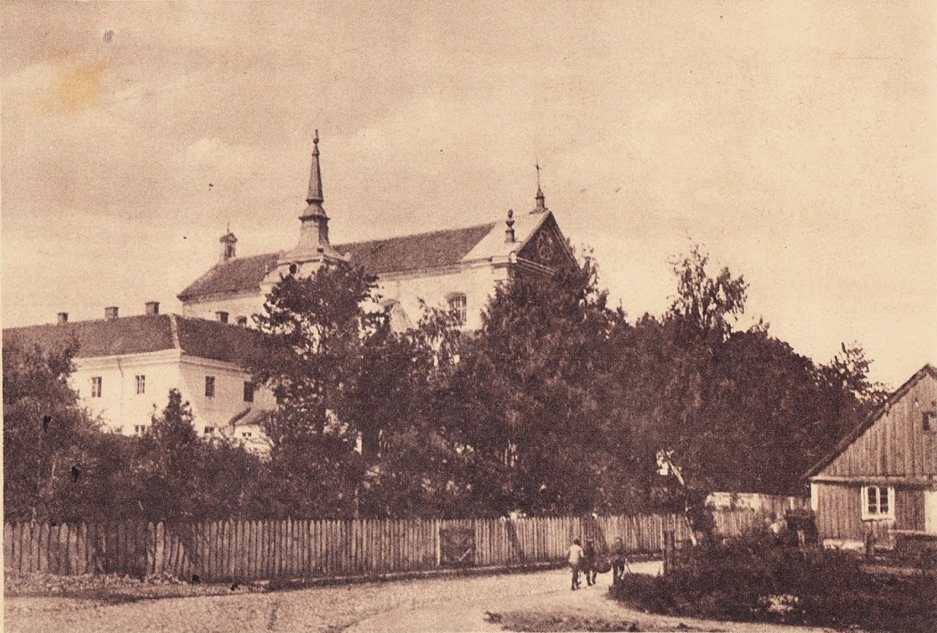 Zespół popijarski 1697-1711 r. architekt Józef Piola.